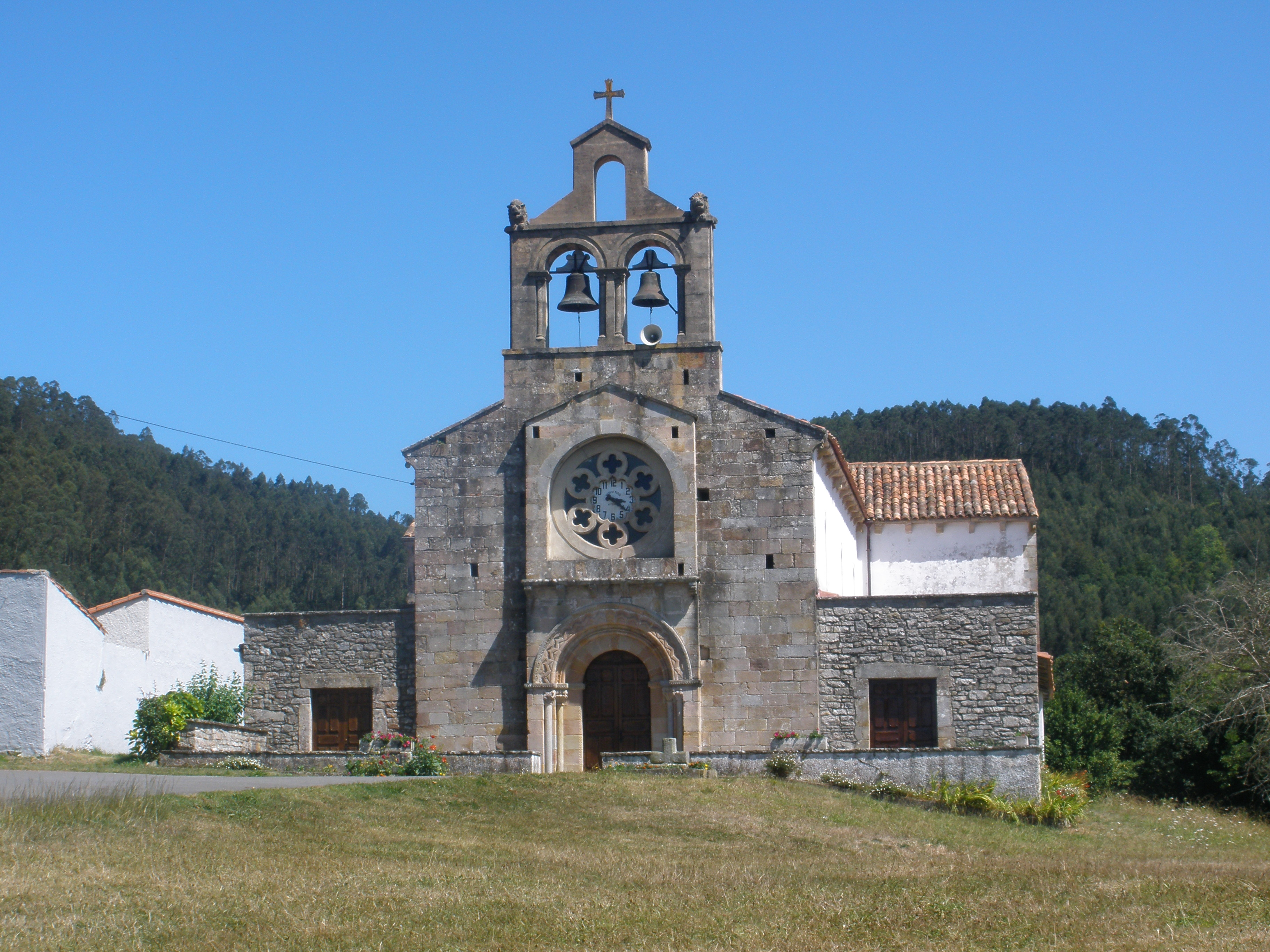 Vista general de la iglesia de Santa Eulalia (Selorio, Villaviciosa) en agosto de 2012